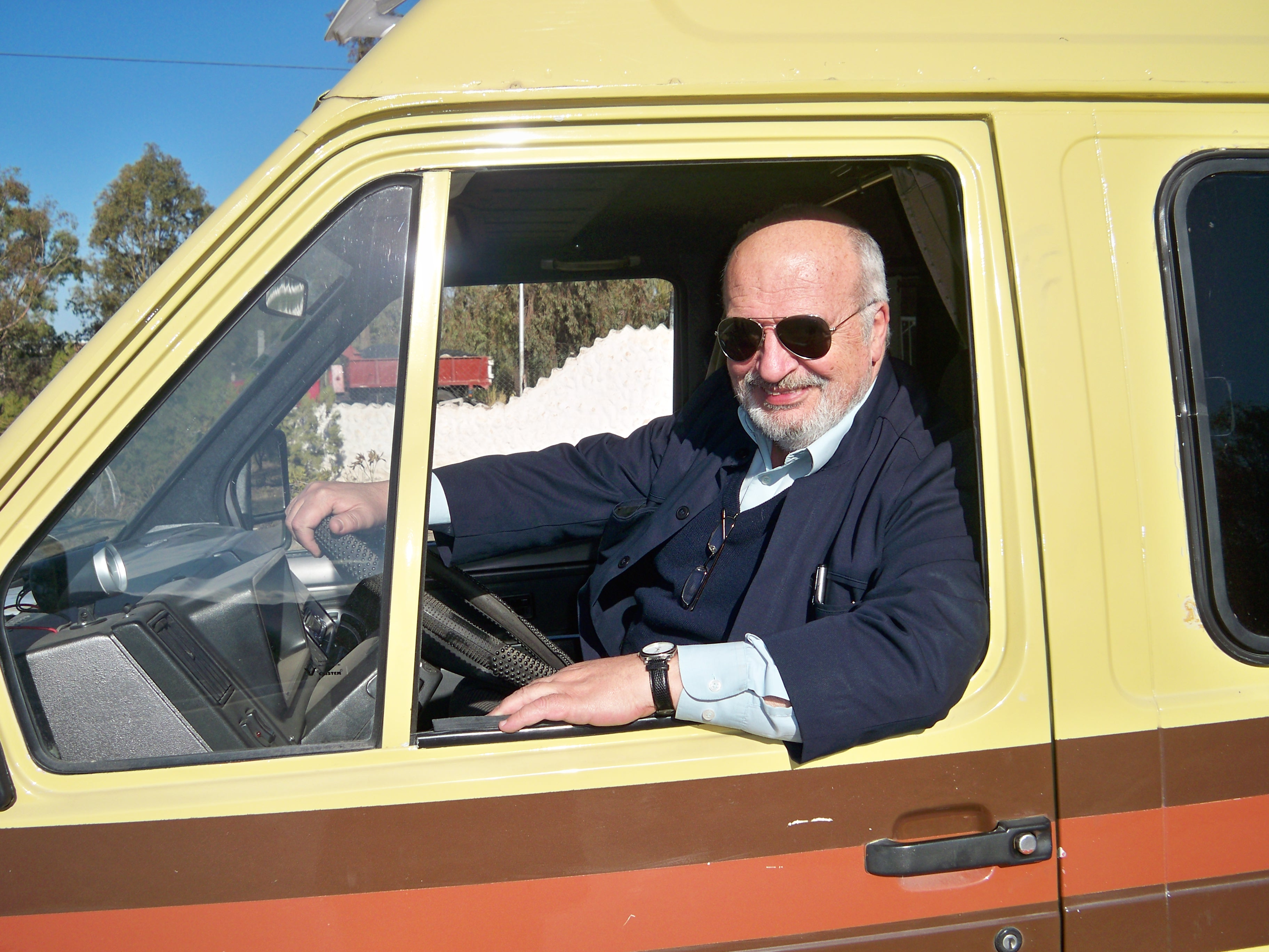 El Dr. Horacio Cuervo Zenié conduciendo el motorhoe Renault Trafic modelo '88, a la que bautizó 'Clementina', con la que recorrerá 37 mil Km. entre Argentina y Canadá, en una travesía que abarcará 20 países y 163 ciudades.